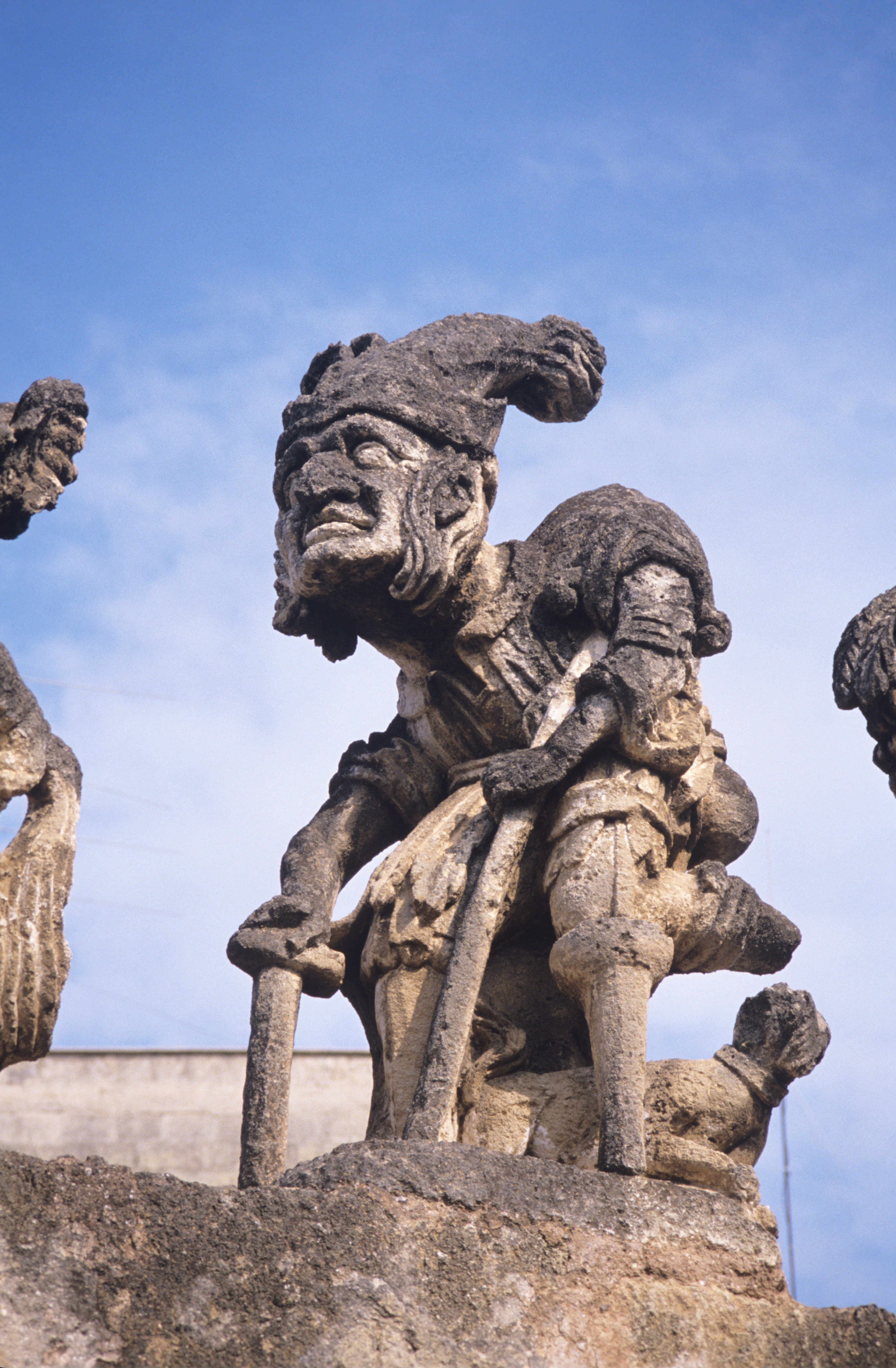 Villa Palagonia: Bagheria, Sicile, Italie.